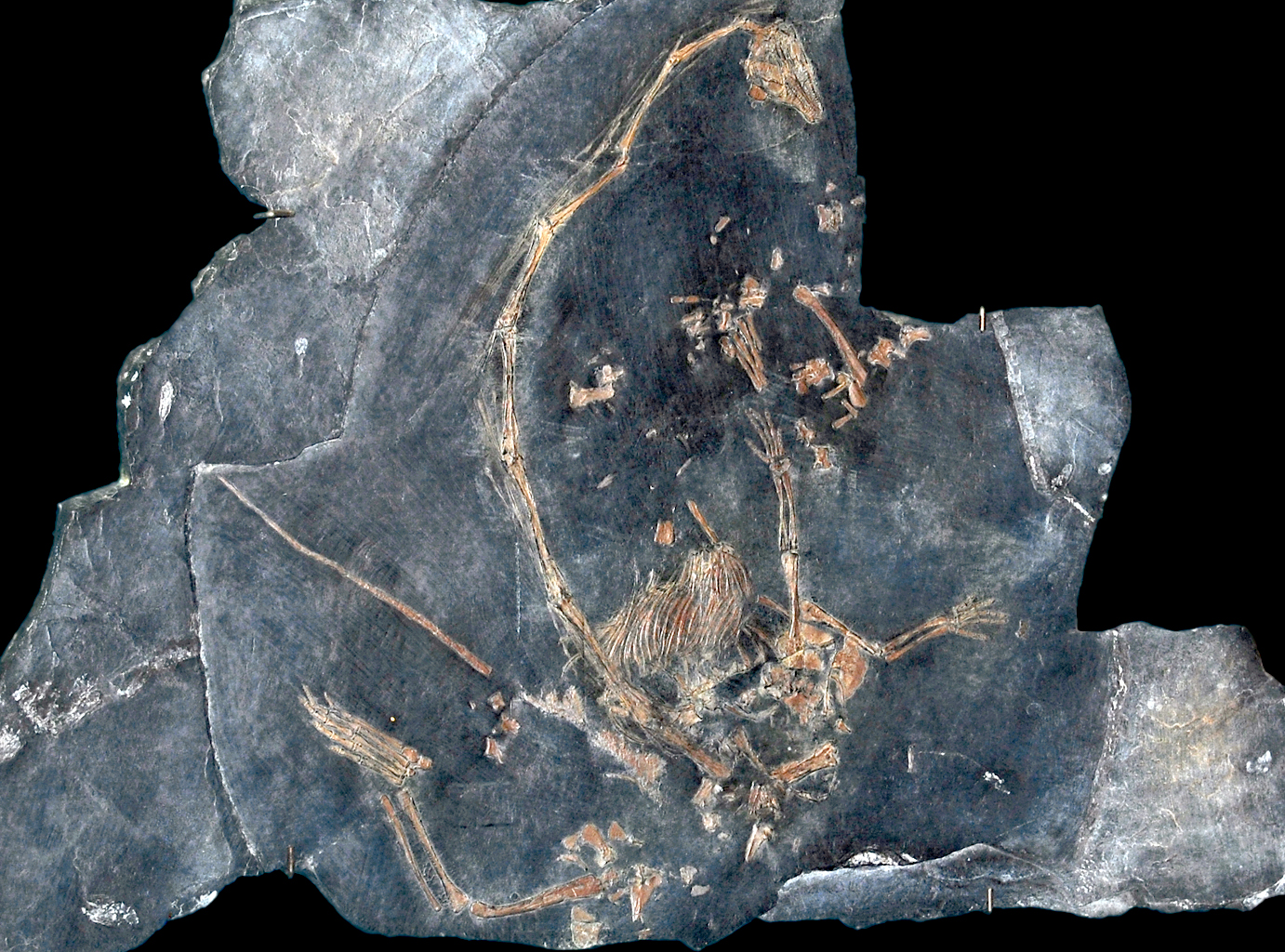 Museo civico di storia naturale Milano